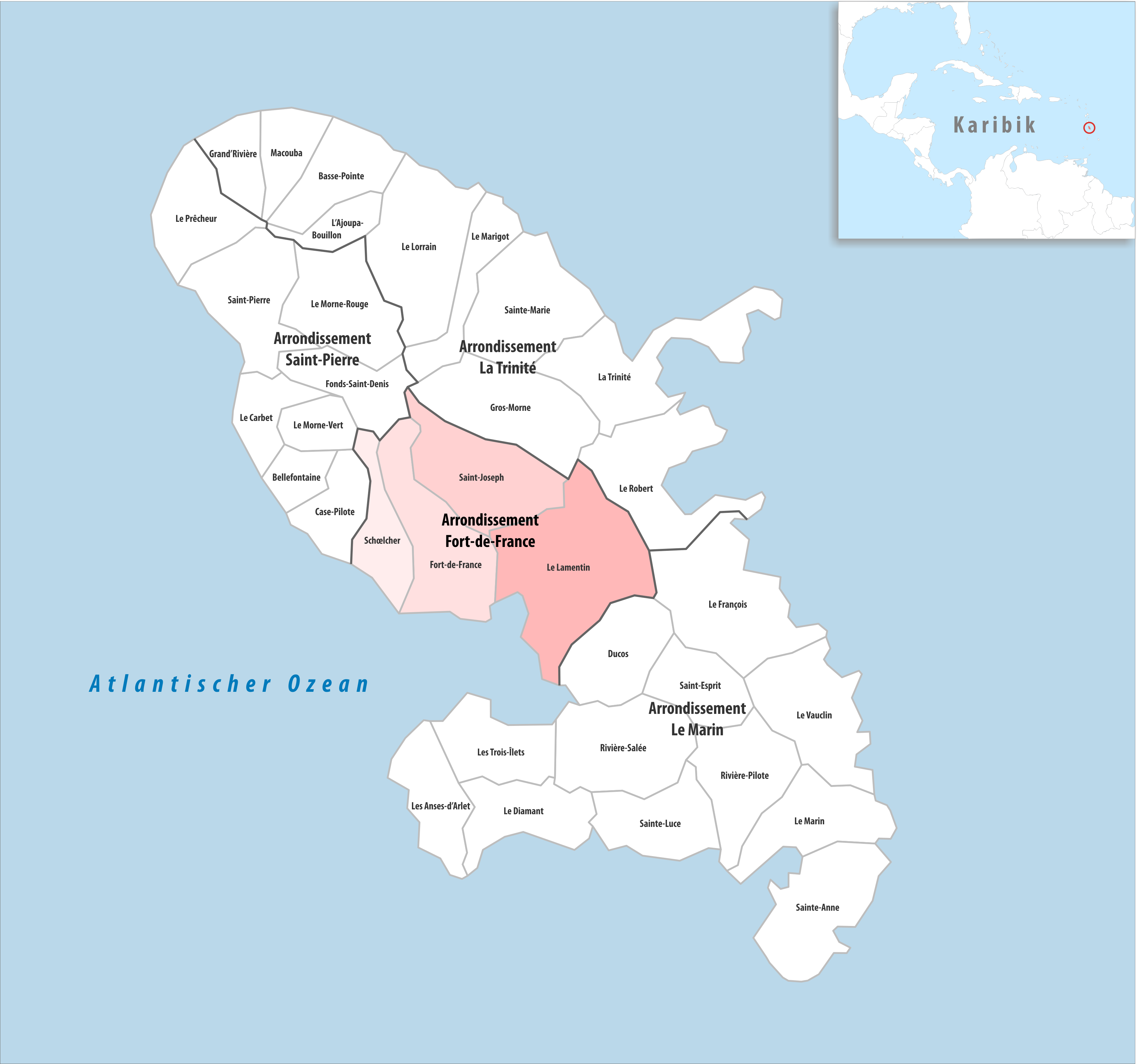 Lage des Arrondissements Fort-de-France